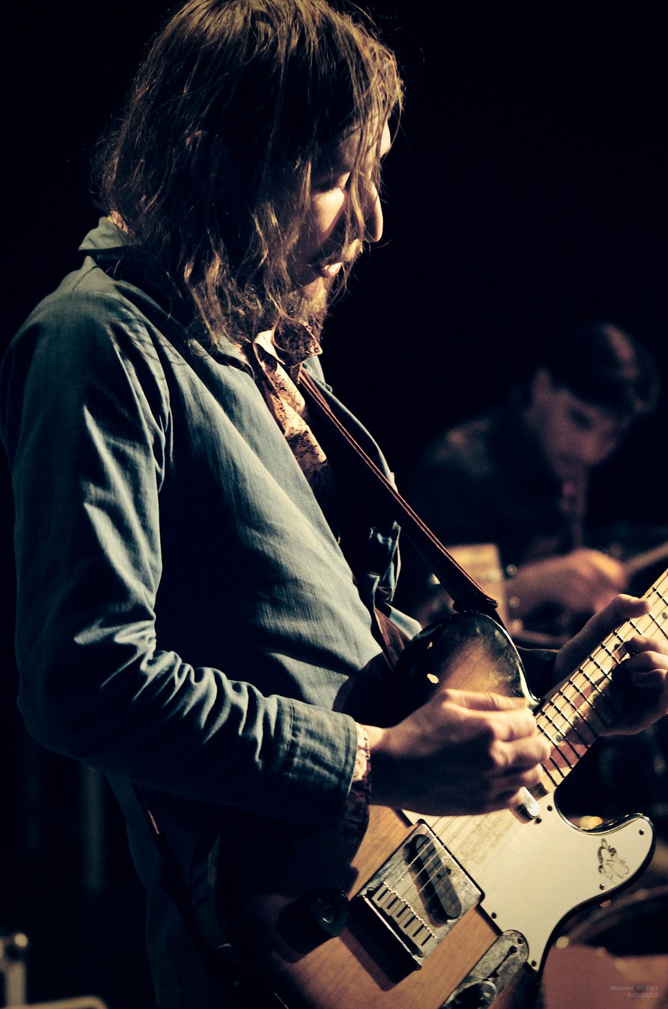 Robert Elektrozoo, live, Kammerkonzerte Leipzig.